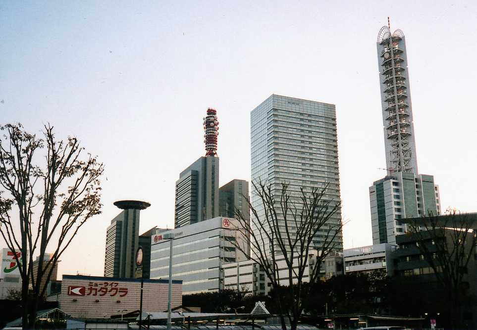 さいたま新都心東側から西側を望む。2008年秋に利用者が撮影。